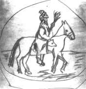 Гравирование по металлу - на поддоне подсвечника XVII века. Опричник на коне с метлой и песьей головой.